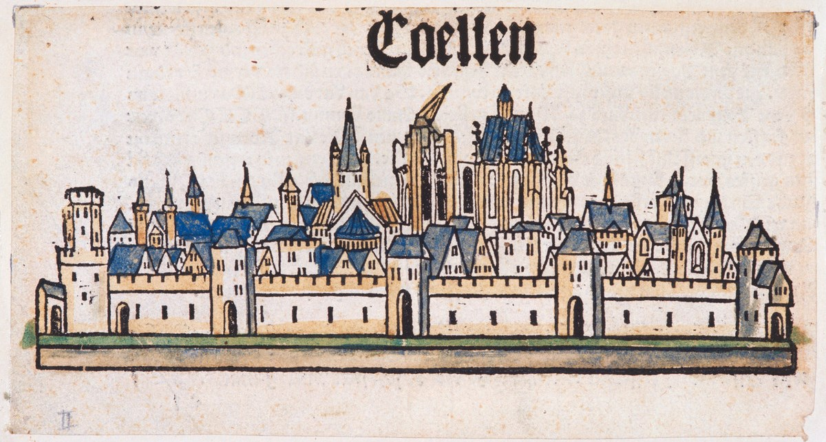 Holzschnitt: Koelhoffsche Chronik (1499)